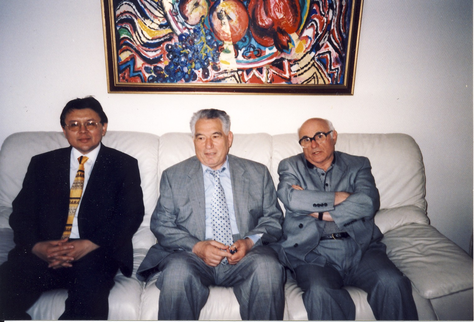 Частная встреча профессора Леонида Левитина с всемирно известным писателем Чингизом Айтматовым в одном из консульских учреждений Республики Кыргызстан в Европе